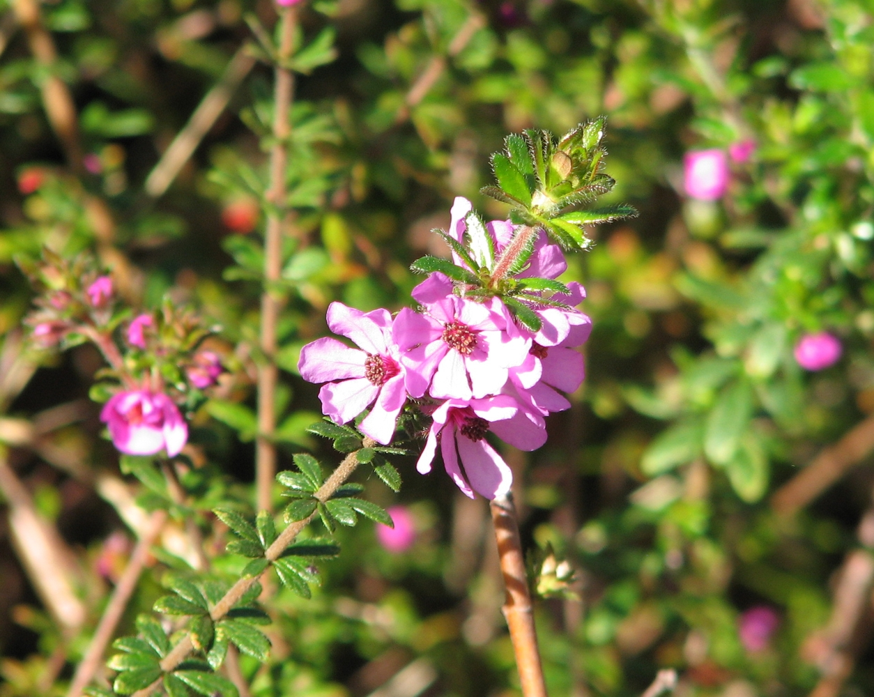 Bauera sessiliflora, Maranoa Gardens, Balwyn, Victoria, Australia